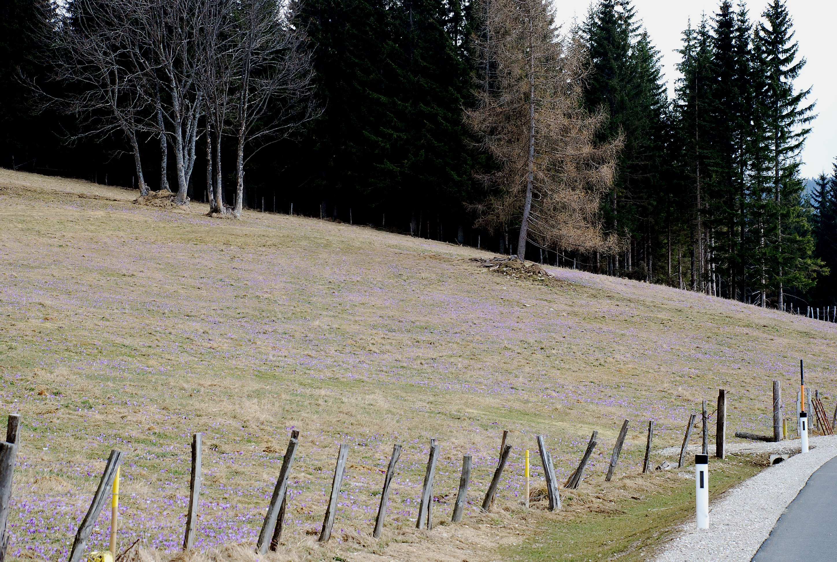 Krokusblüte auf der Hebalm, Koralpe, Steiermark und Kärnten, Österreich